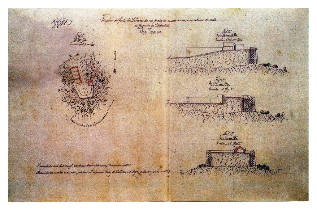 "Tombo do forte de S. Fernando na ponta de mesmo nome...", Ilha Terceira (Açores), Portugal.